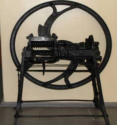 Січкарня — механічне знаряддя для подрібнення (перетворення в січку) рослинних кормів на годівлю худобі, птиці.